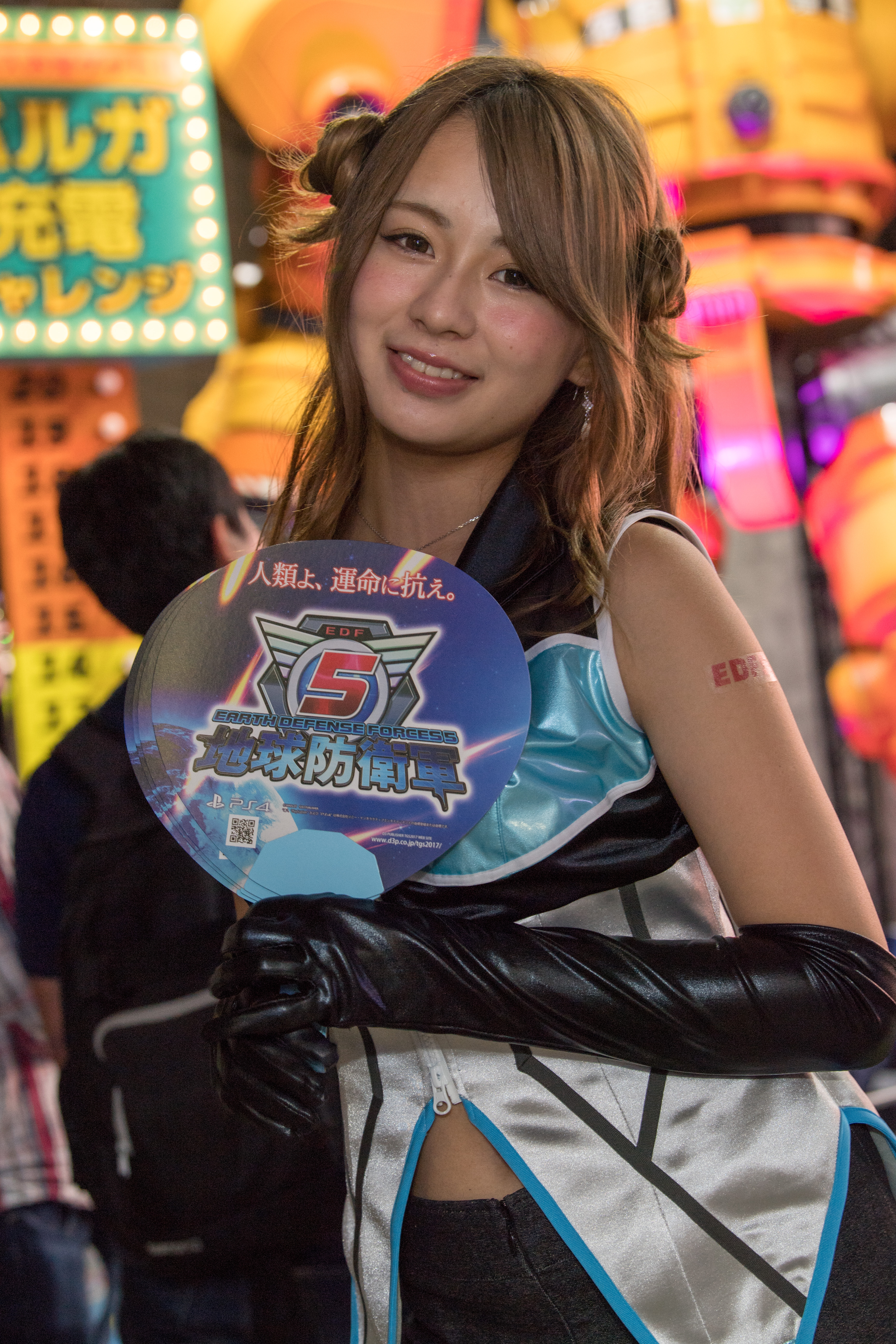 20170922-DSC_2285